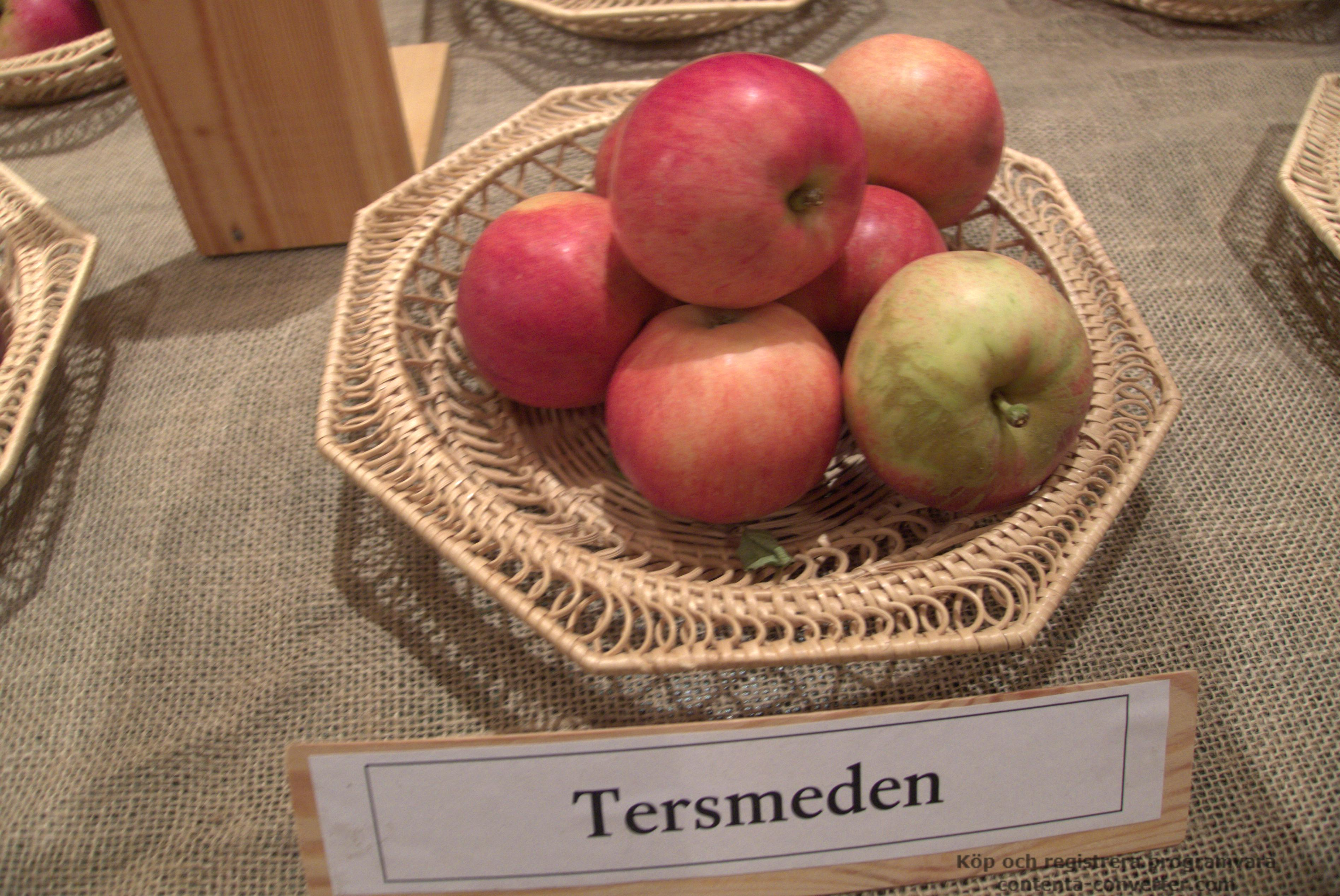 Äpplen av sorten Tersmeden